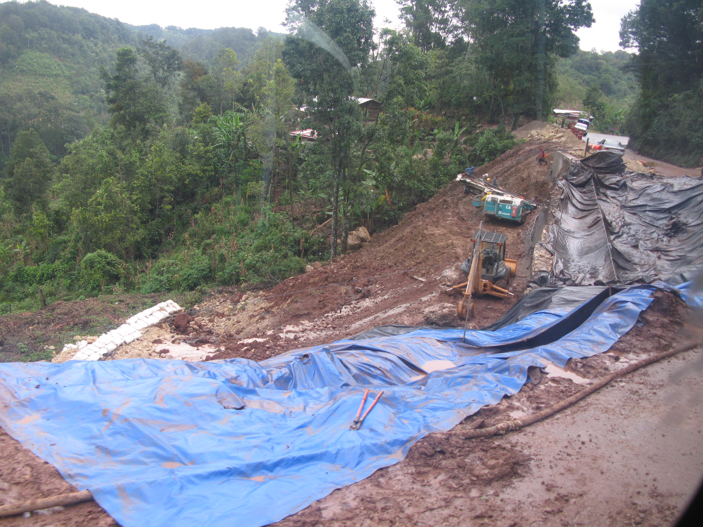 Potek sanacije zemeljskega plazu, ki je nastal po obilnem deževju na poti v Palenque, Mehika